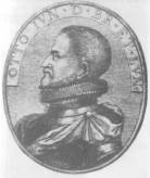 Otto von Braunschweig-Lüneburg, Herzog von Harburg